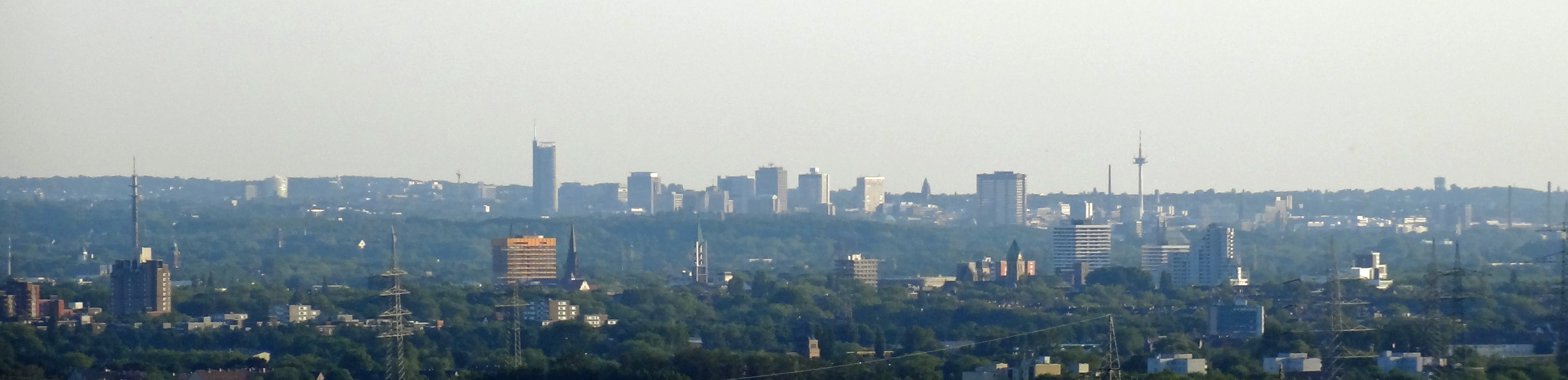 Blick auf Essen, im Vordergrund Gelsenkirchen